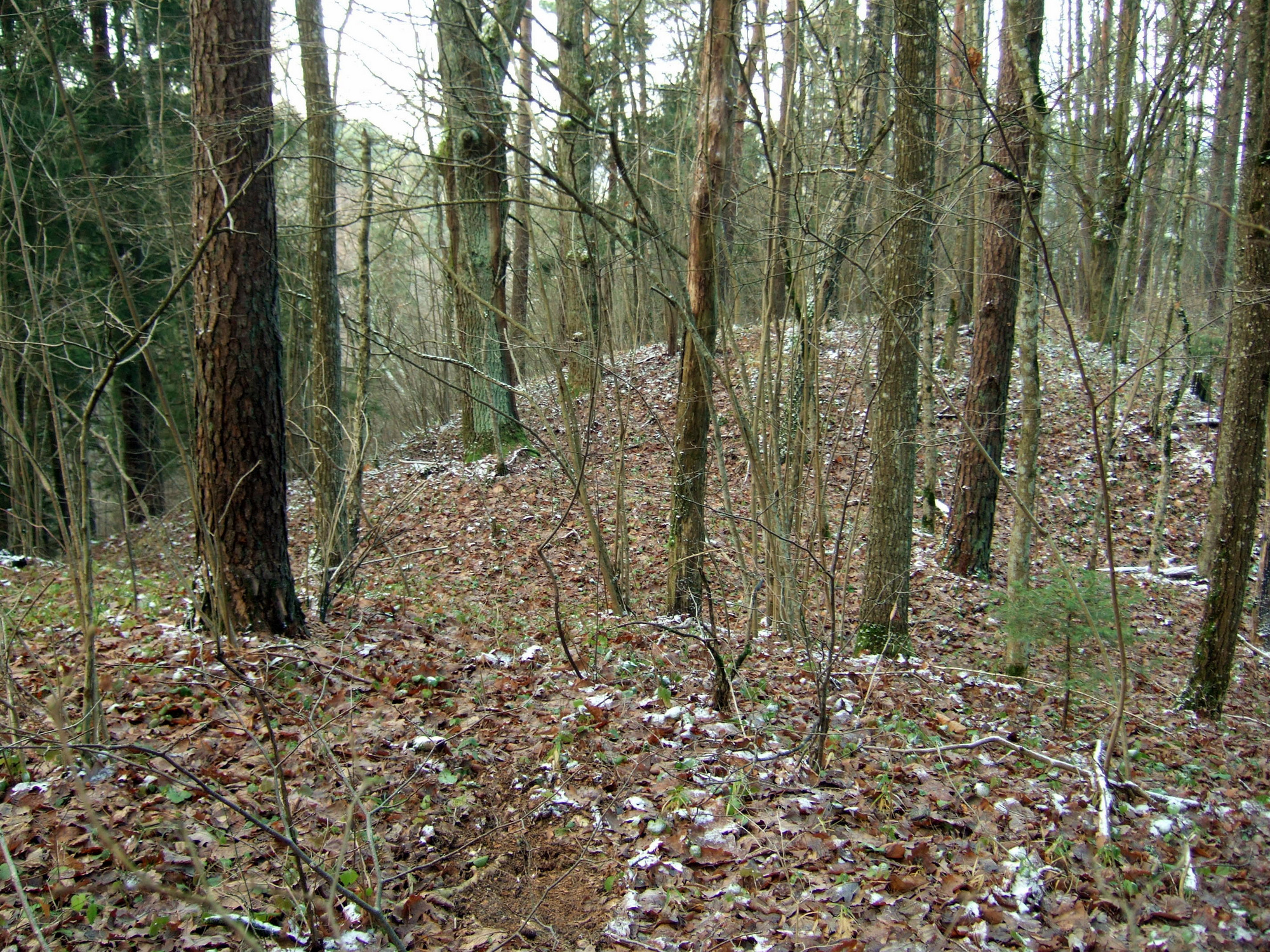 Panerių II piliakalnio aikštelė